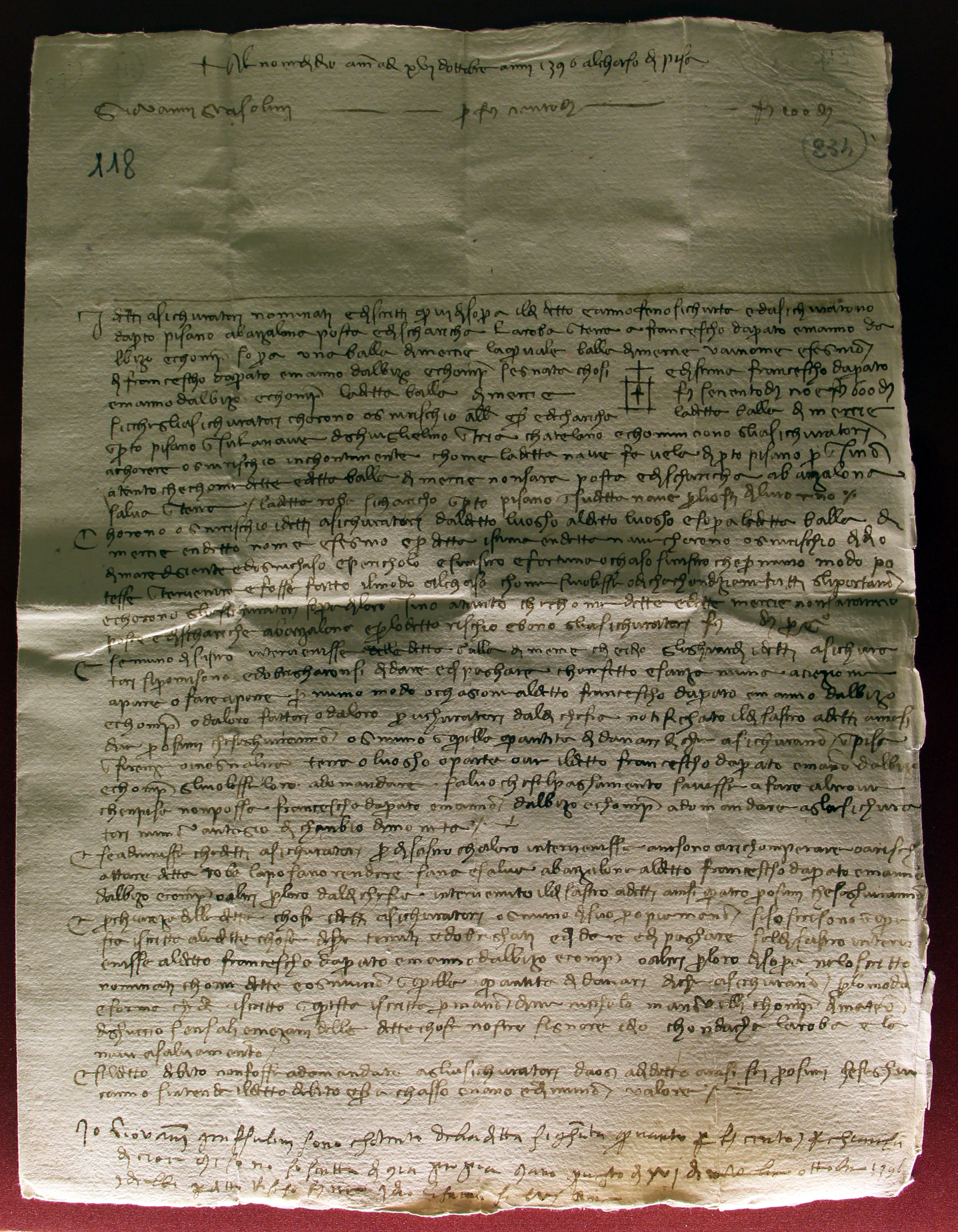 Palazzo Datini - Prato